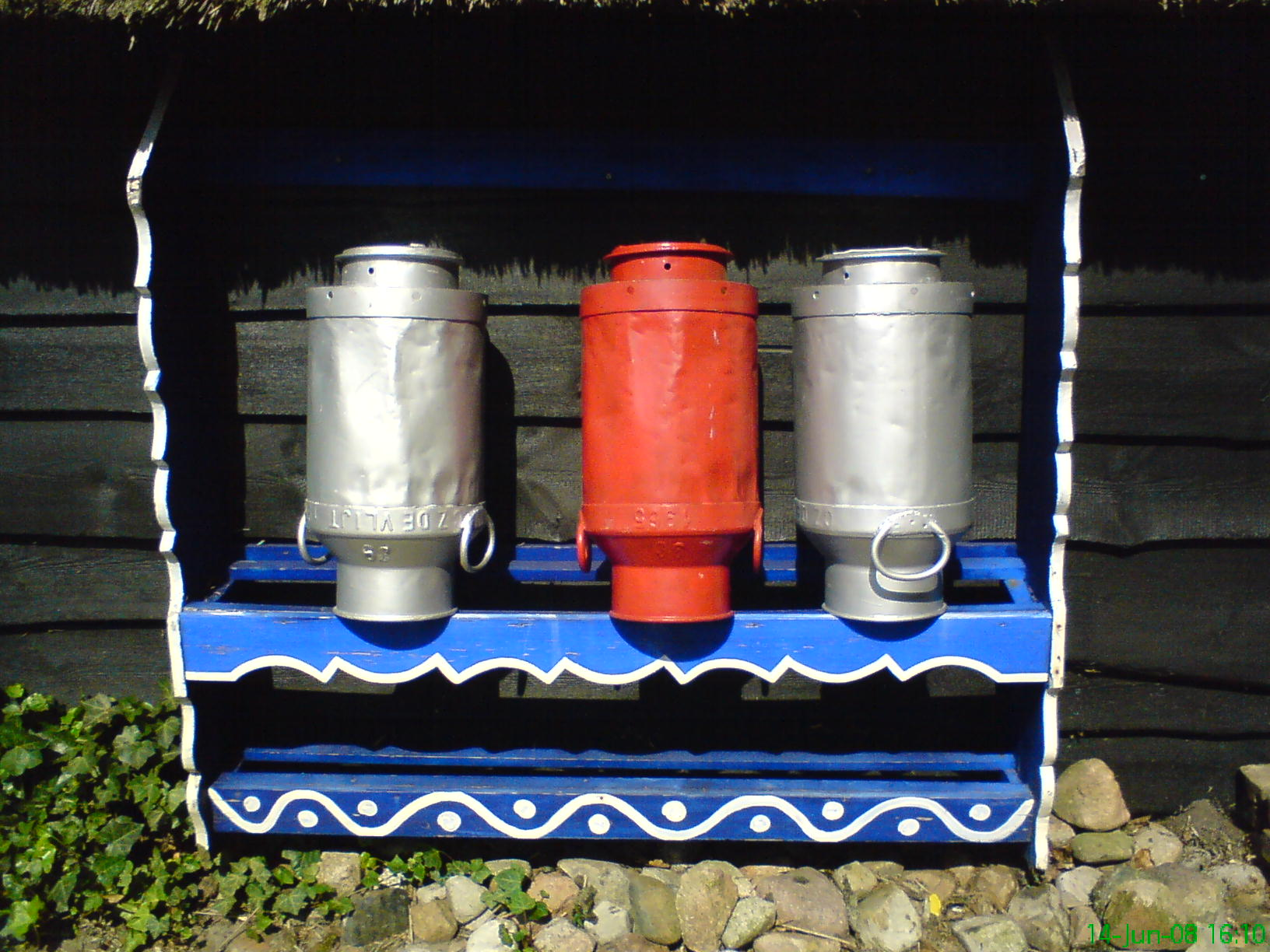 Staphorster melkbussen